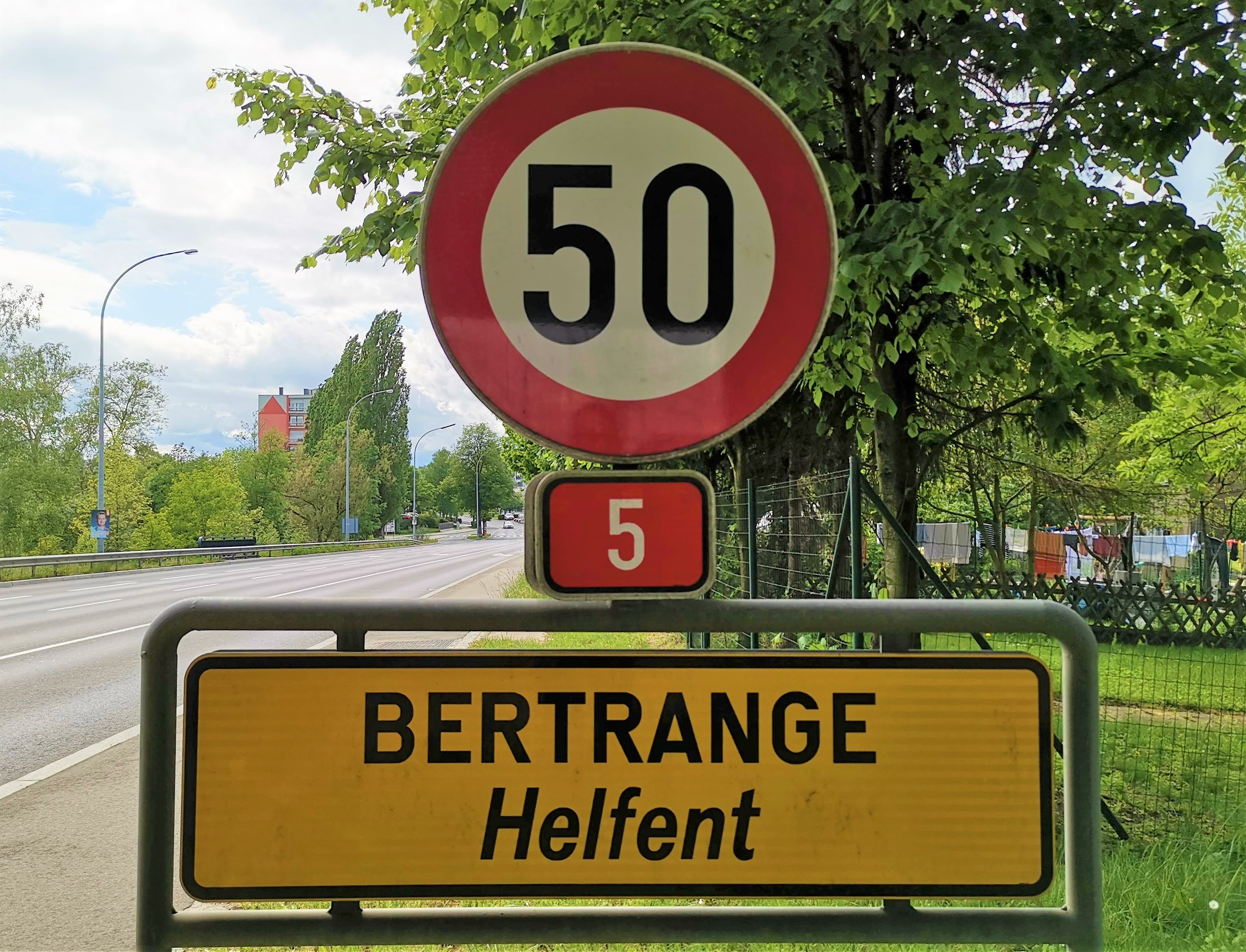 Signal routier E,9a "Localisation" du Code de la Route luxembourgeois.